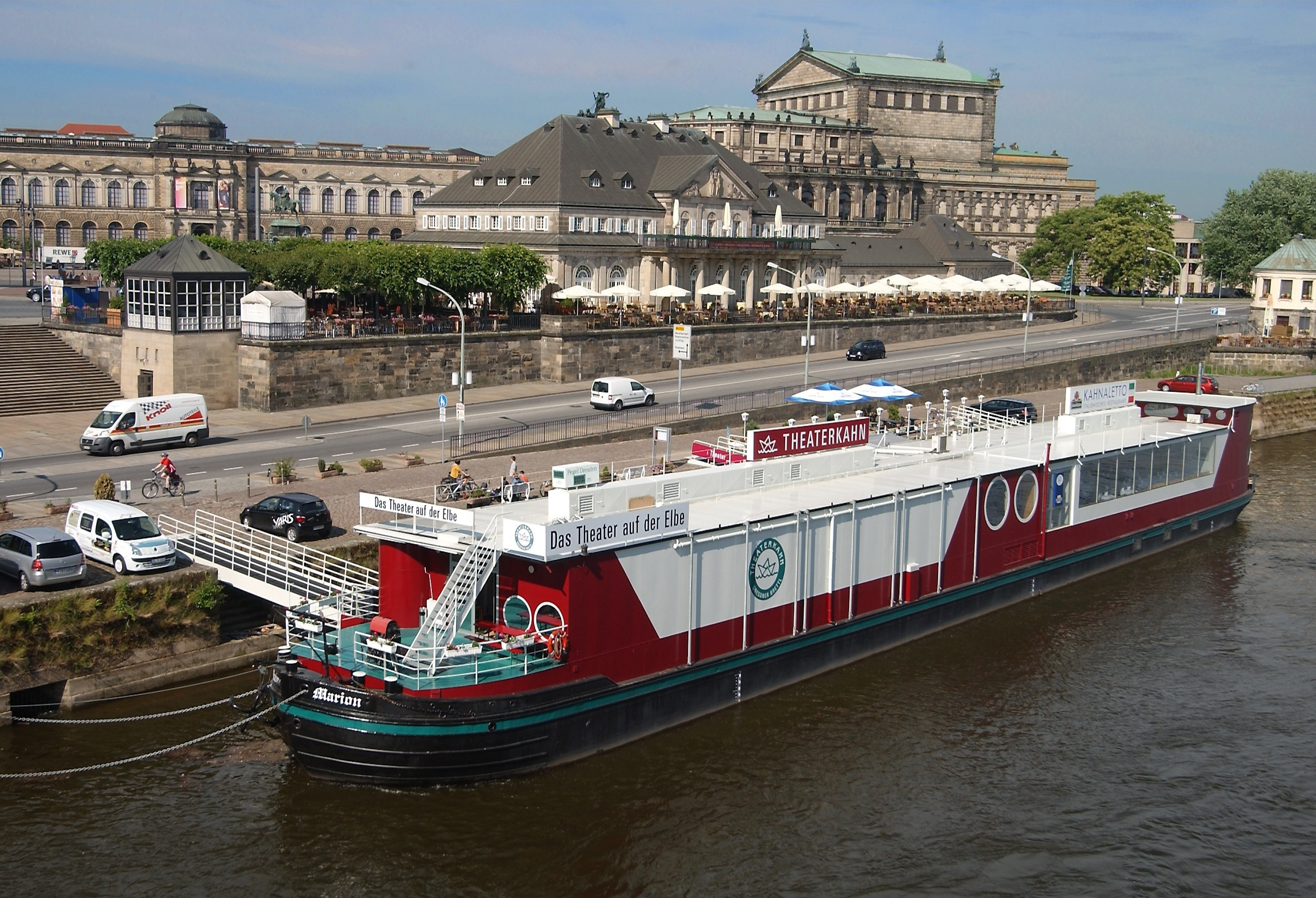 Der Dresdner Theaterkahn am Terrassenufer